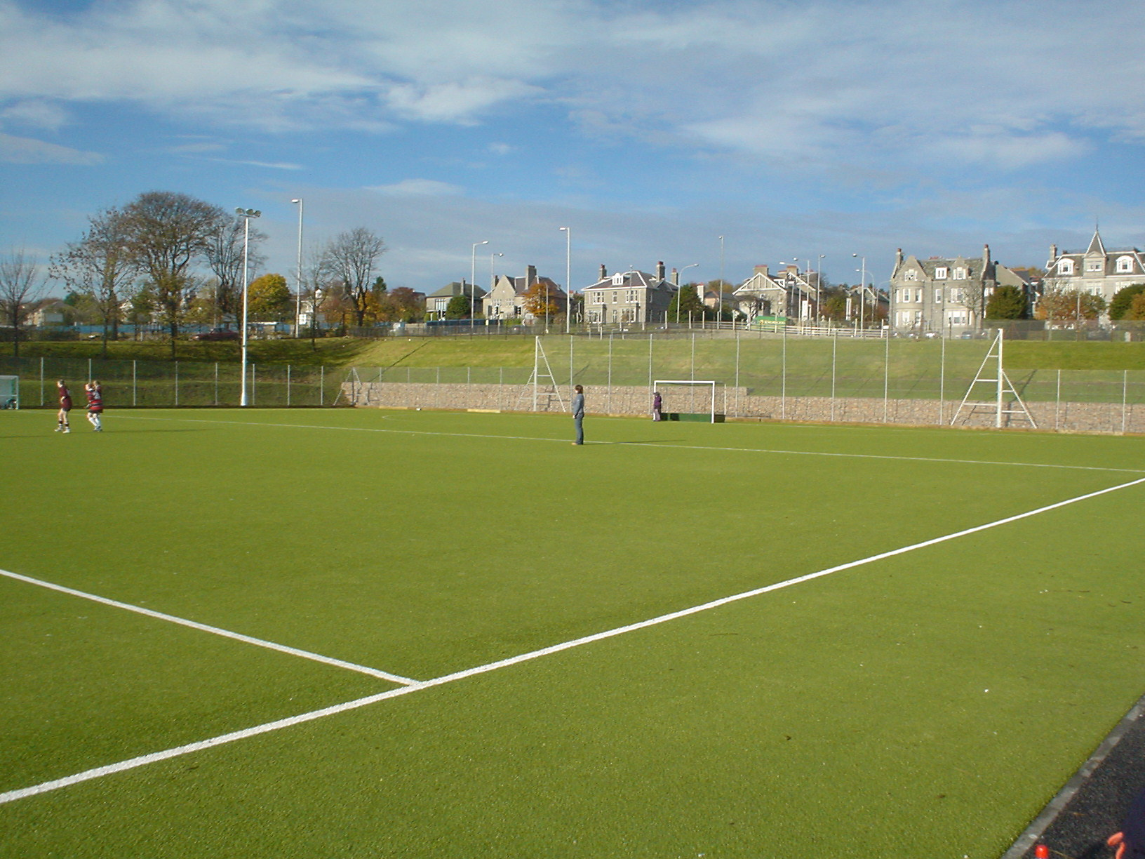 Rubislaw Playing Fields, Aberdeen, Scotland. Category:Aberdeen